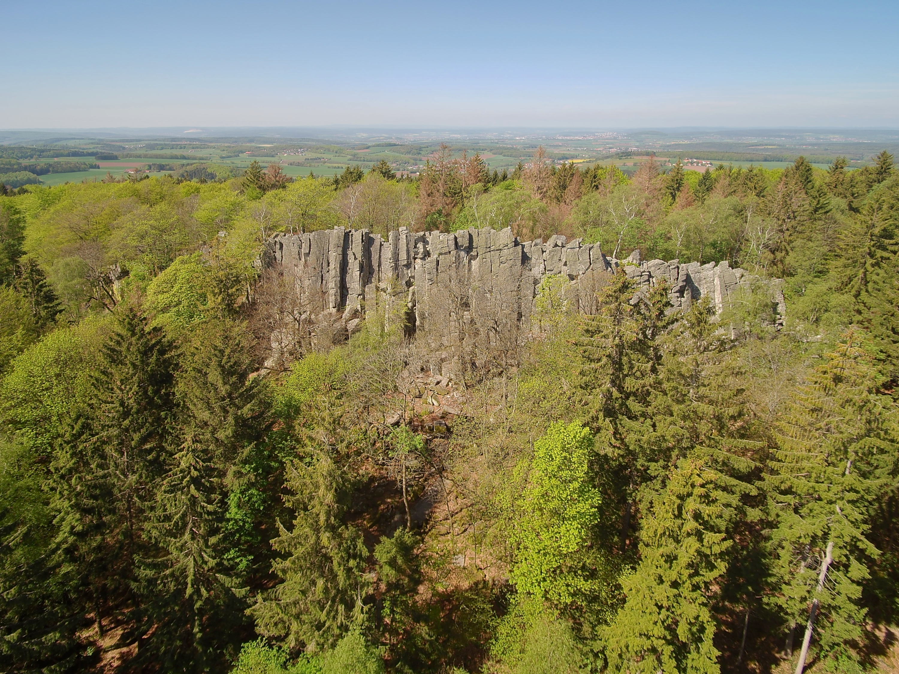 Steinwand